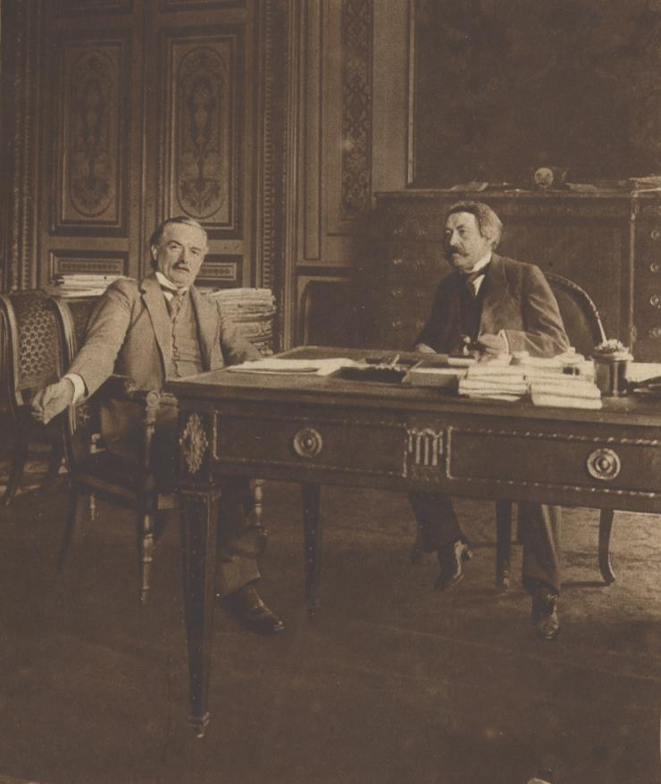 M. Briand reçoit au quai d'Orsay M. Lloyd Geroge, ministre de la guerre anglais.